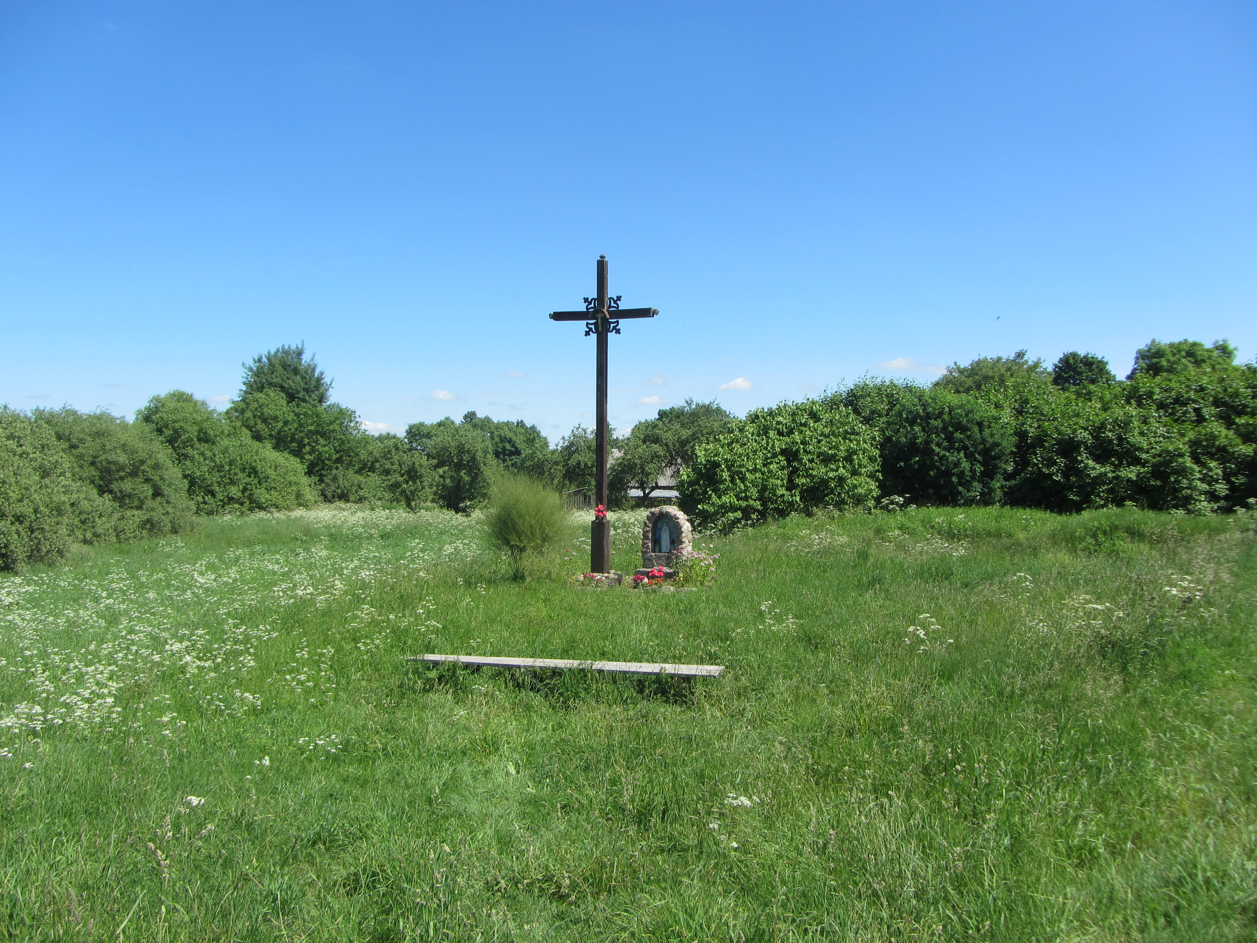 Antanaičiai 19150, Lithuania